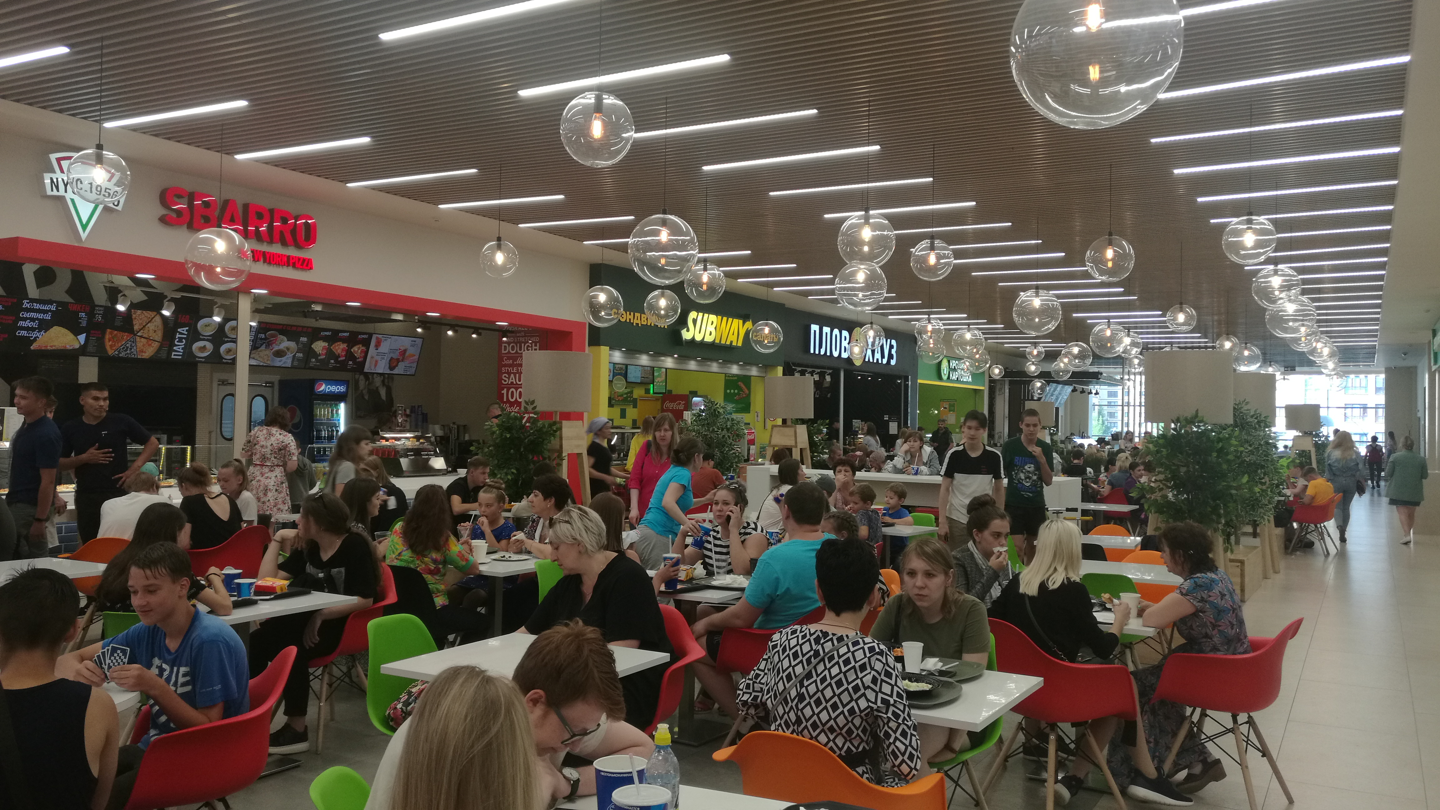 Manĝokorto de Goodwin. Tjumeno, Rusio.